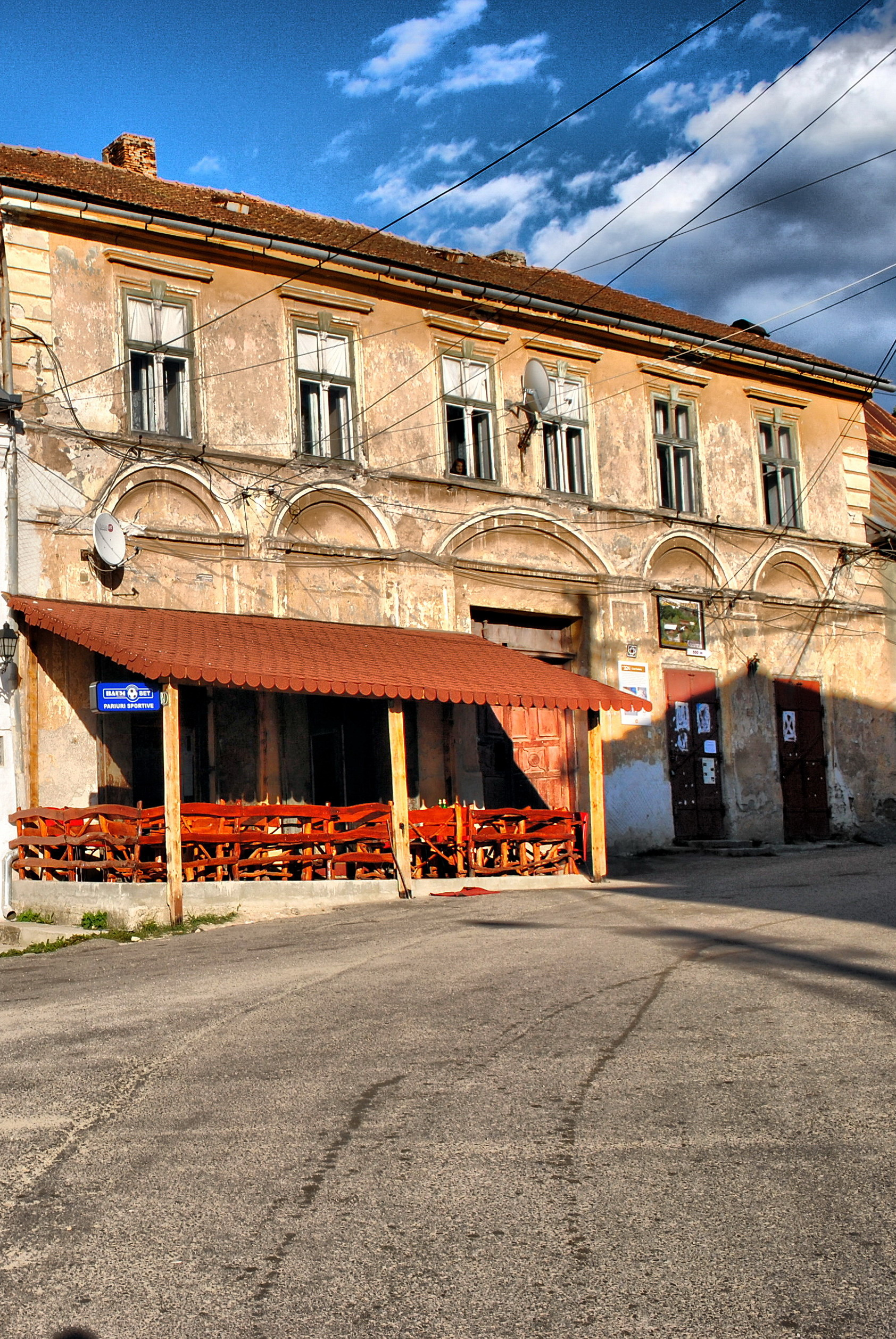 Construită în anul 1876 și clasată ca monument istoric, casa poate fi considerată cea mai impozantă clădire de factură urbană a pieței.